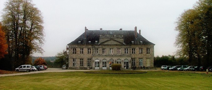 Chateau de la Rochette (77000)